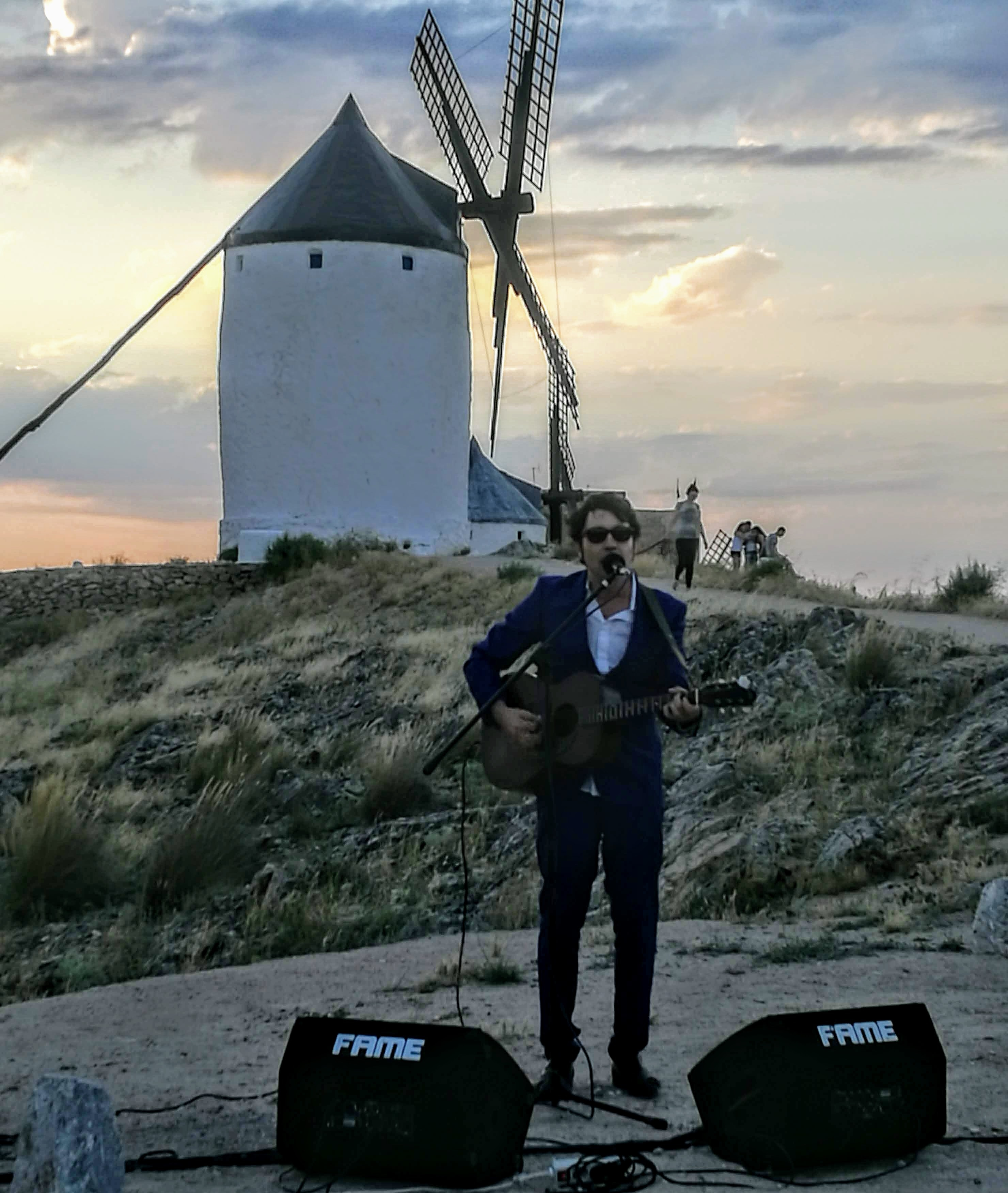 "Atardeceres en vivo" Consuegra, Toledo. Junio 2018